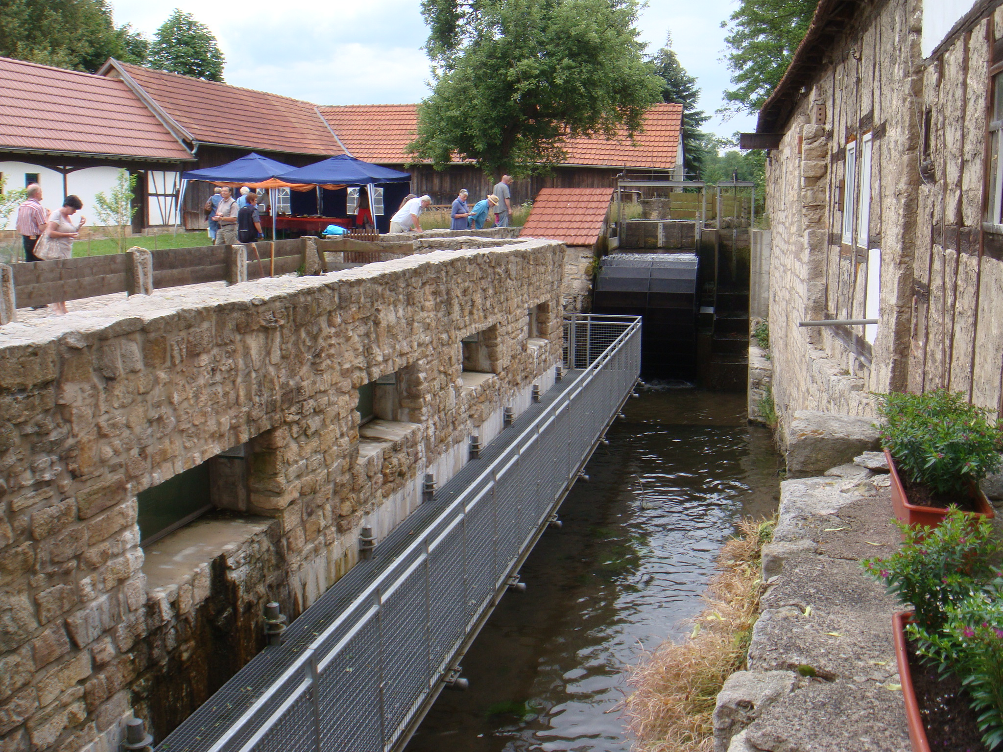 Mühle an der Ilm mit oberschlächtigem Wasserrad